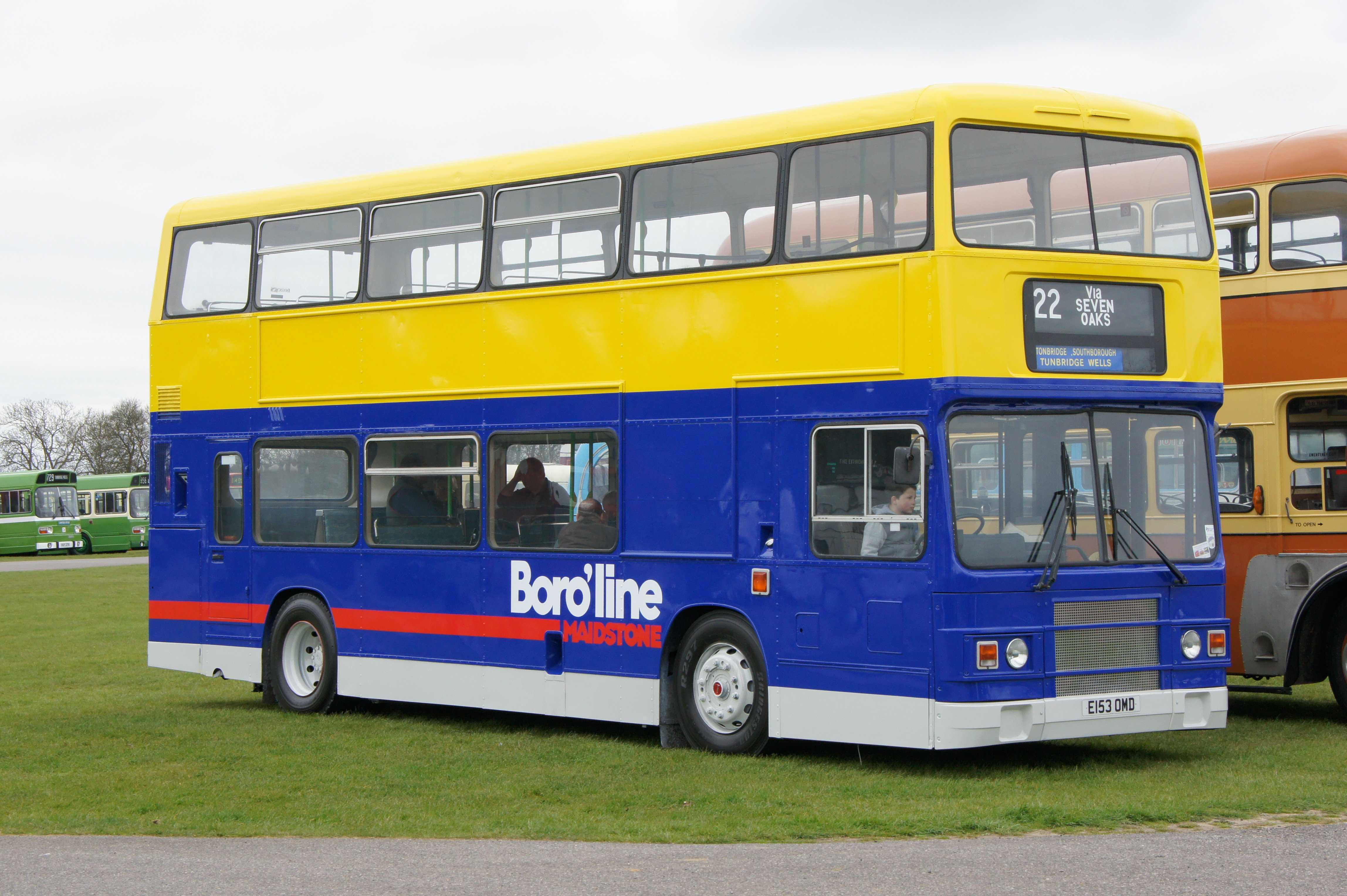 E153OMD-1 310312 CPS